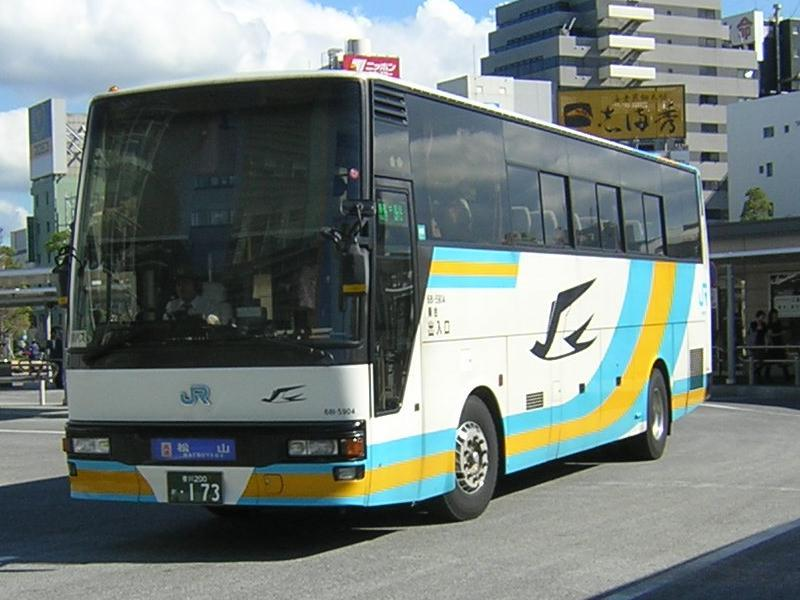 登録番号 香川200か・173 ジェイアール四国バス(JR Shikoku bus)高松支店所属 坊っちゃんエクスプレス号用